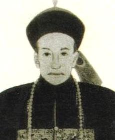 Heshen